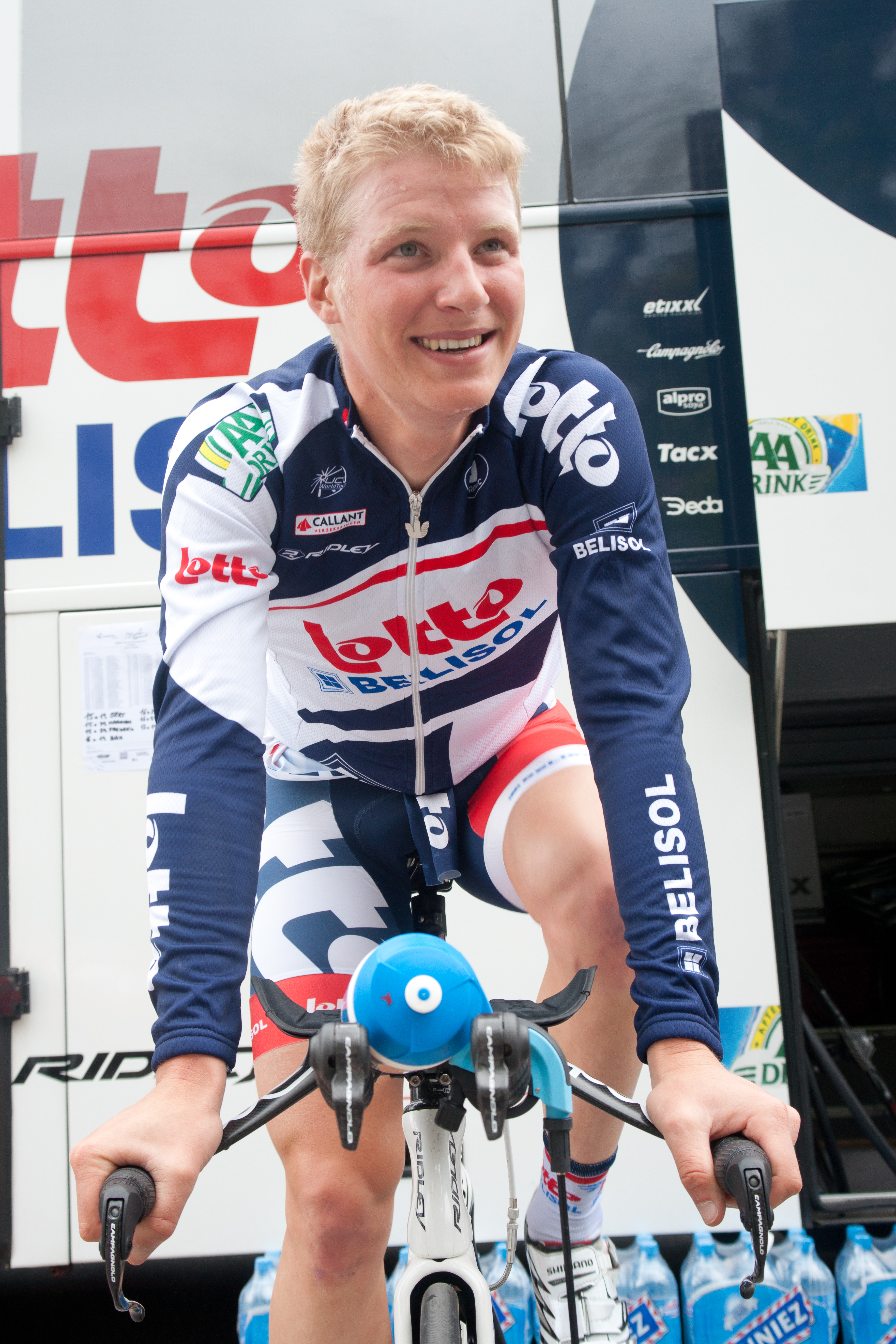 Gert Dockx à l'échauffement du prologue du Tour de Romandie 2012.